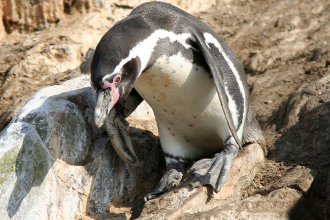 Manchot de Humboldt (Iles Ballestas - Pérou)